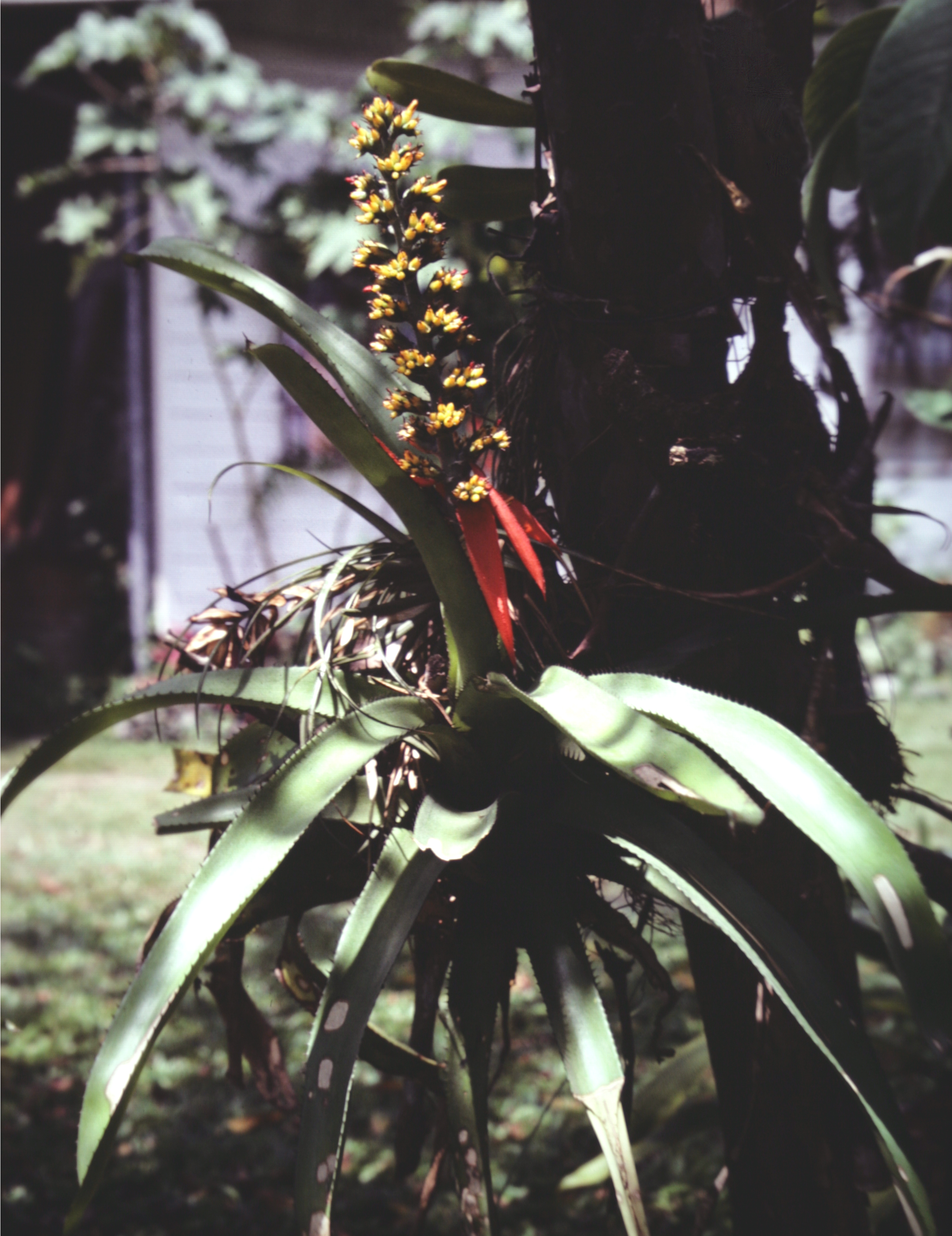 Aechmea mertensii , Suriname